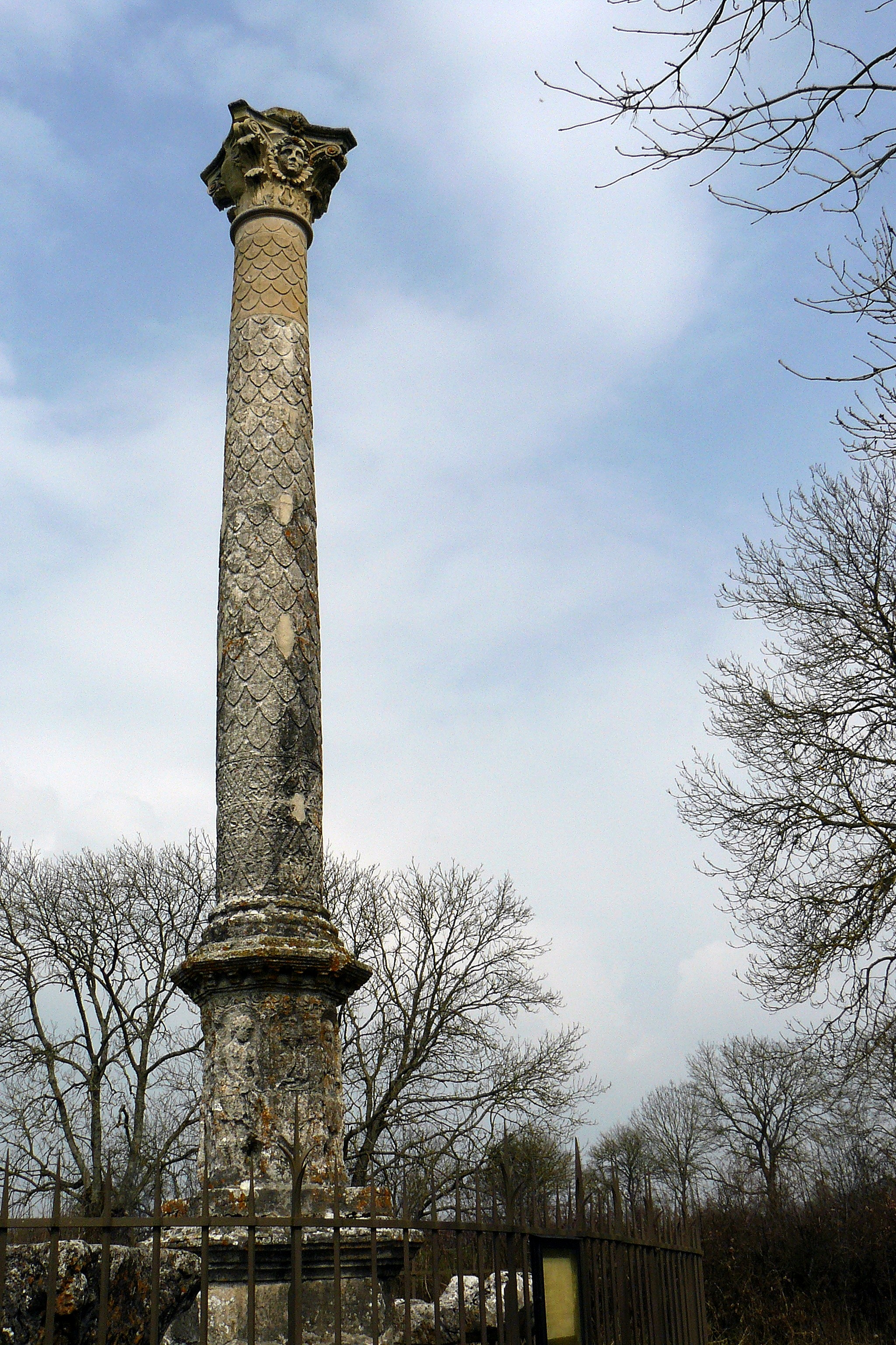 La colonne romaine de Cussy-la-Colonne (Côte-d'Or, France)